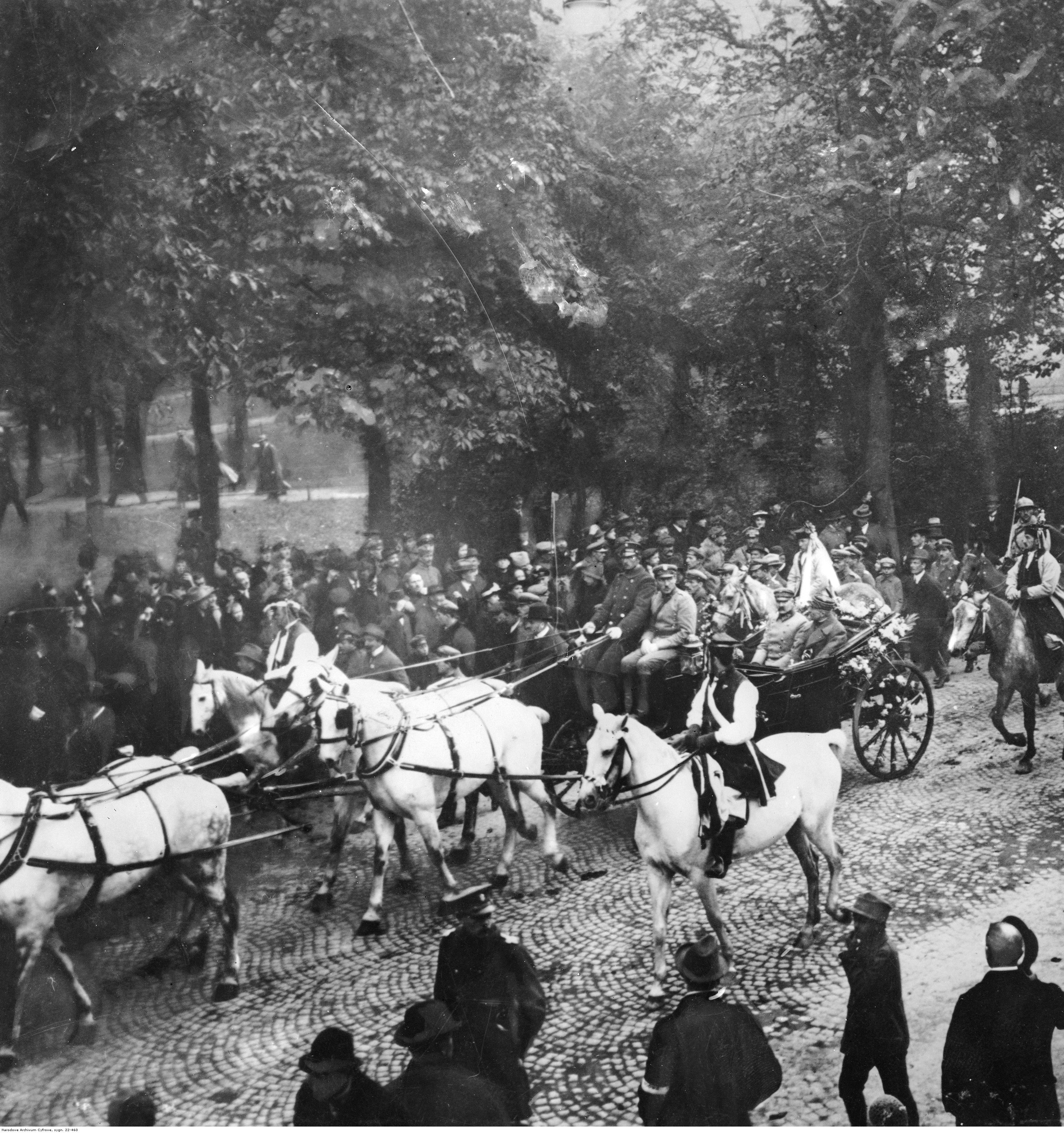 Naczelnik Państwa Józef Piłsudski w drodze na rewię oddziałów wojska na Błonie.